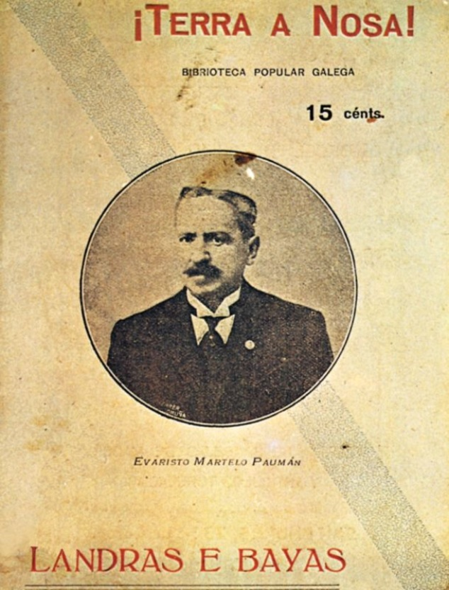 Landras e bayas